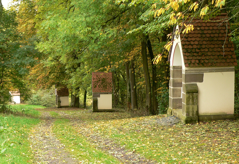 Kreuzweg auf dem Büraberg